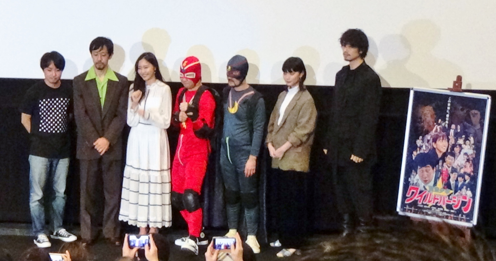 映画『魔法少年☆ワイルドバージン』公開2日目舞台挨拶 左から宇賀那健一（監督）、濱津隆之（小池誠二郎役）、佐野ひなこ（ヒロイン・秋山雪乃役）、前野朋哉（主演・星村幹夫役）、芹澤興人（月野雅臣役）、田中真琴（小島彩花役）、斎藤工（高橋役）